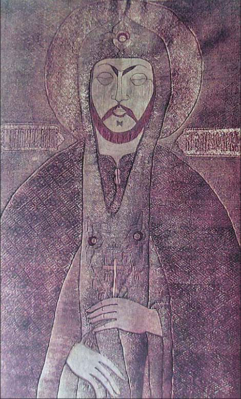 Олександр Невський. Посмертне покривало, поч. XVII ст.